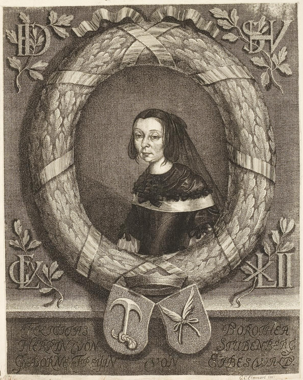 Grafik aus dem Klebeband Nr. 1 der Fürstlich Waldeckschen Hofbibliothek Arolsen Motiv: Felicitas Dorothea von Stubenberg